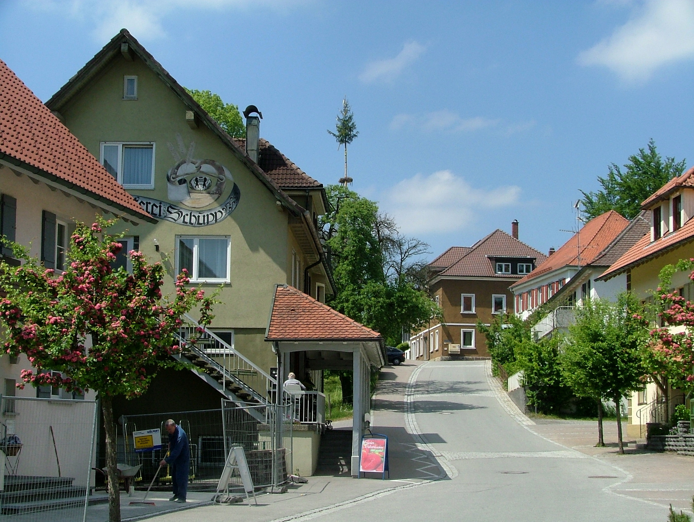 Dorfstraße